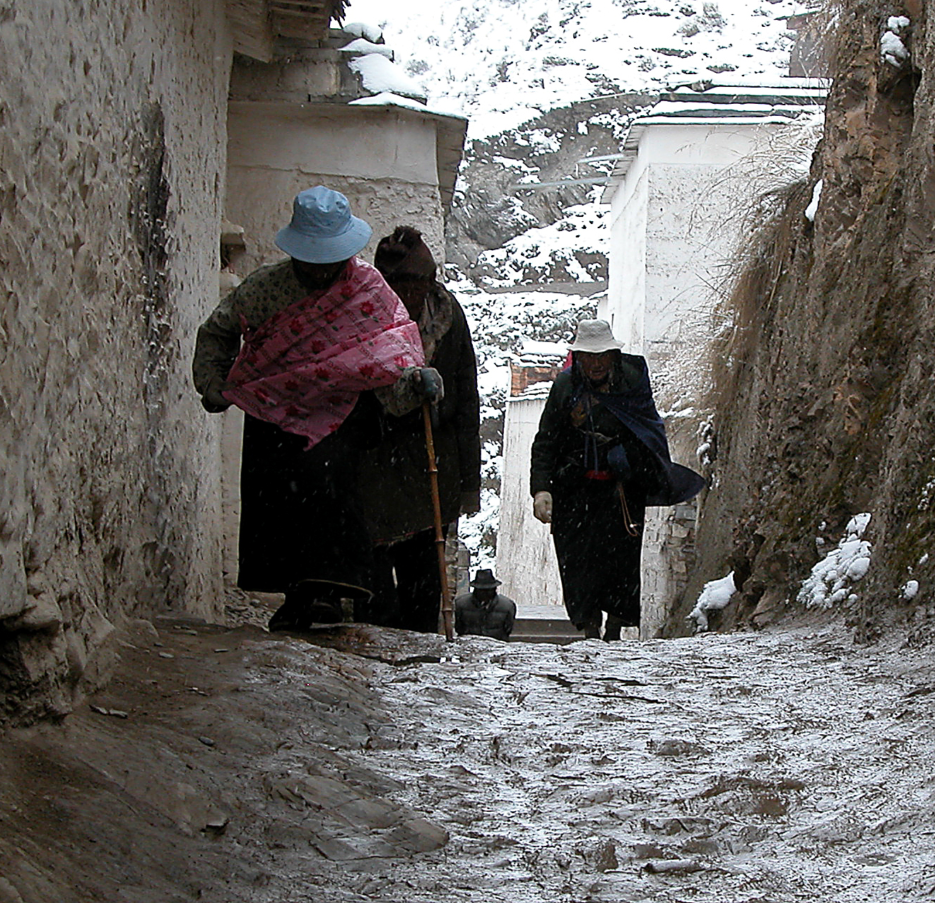 Pélerins à Xiahe.